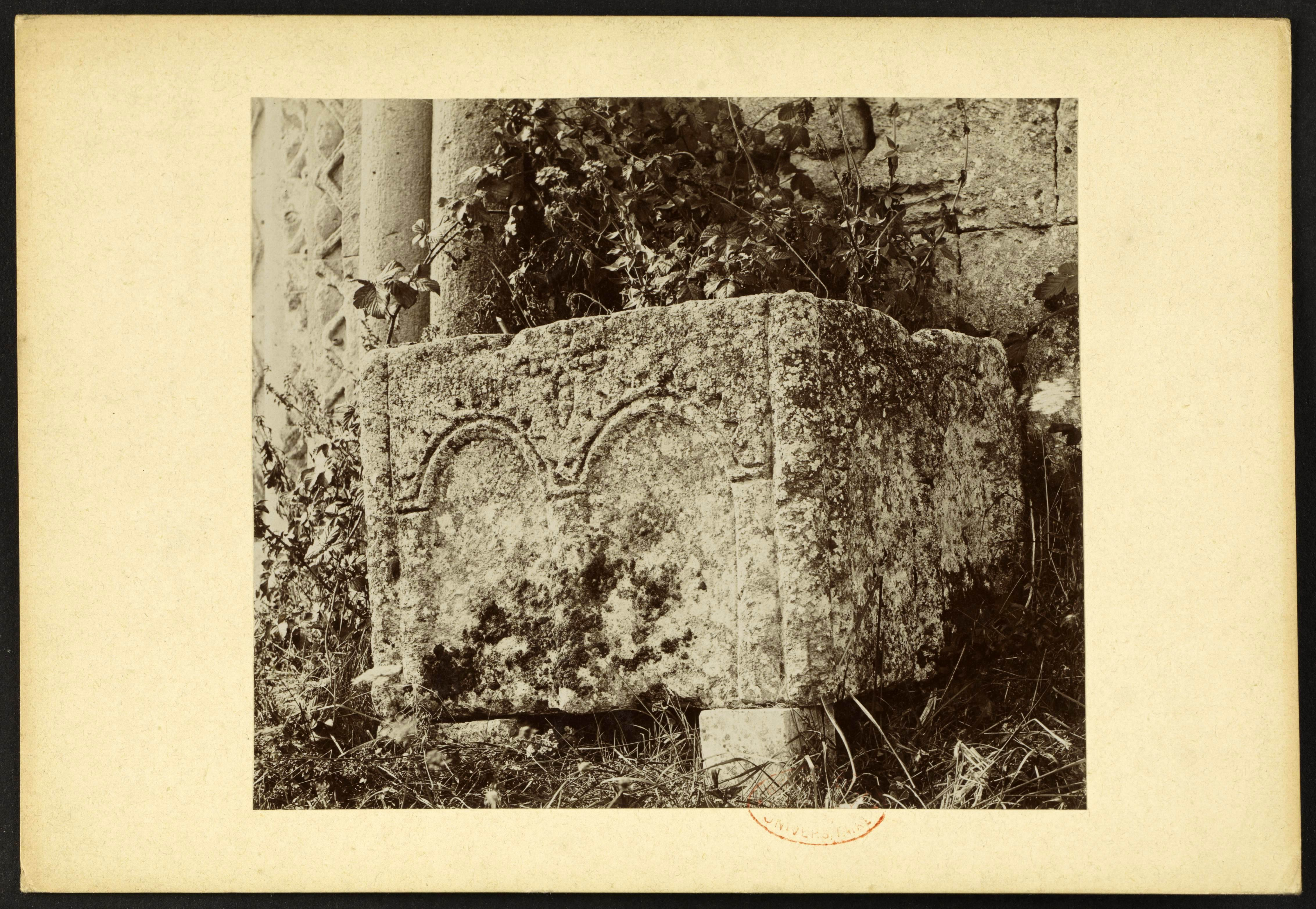 Courpiac église (Brutails)